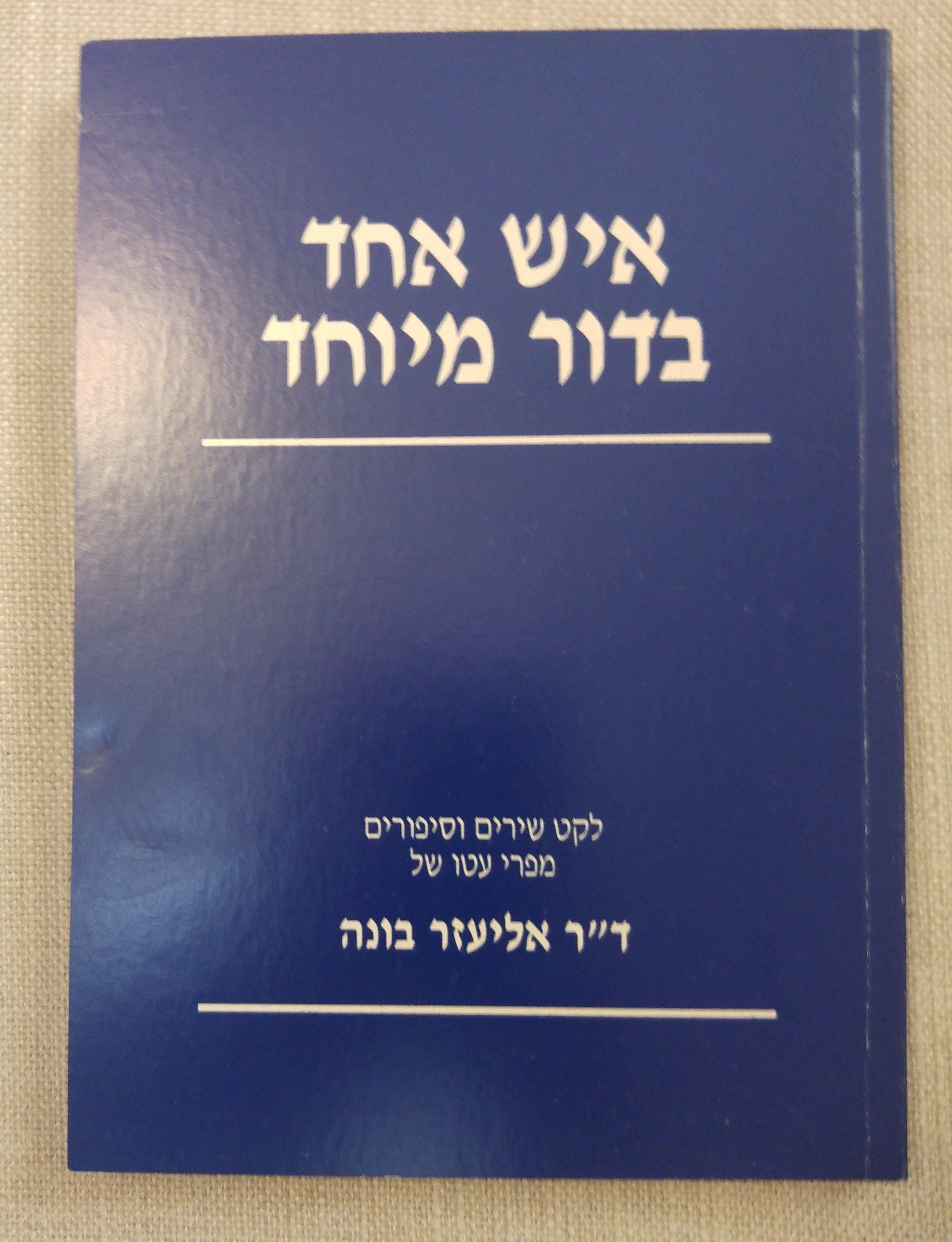 נצה מובשוביץ-הדר